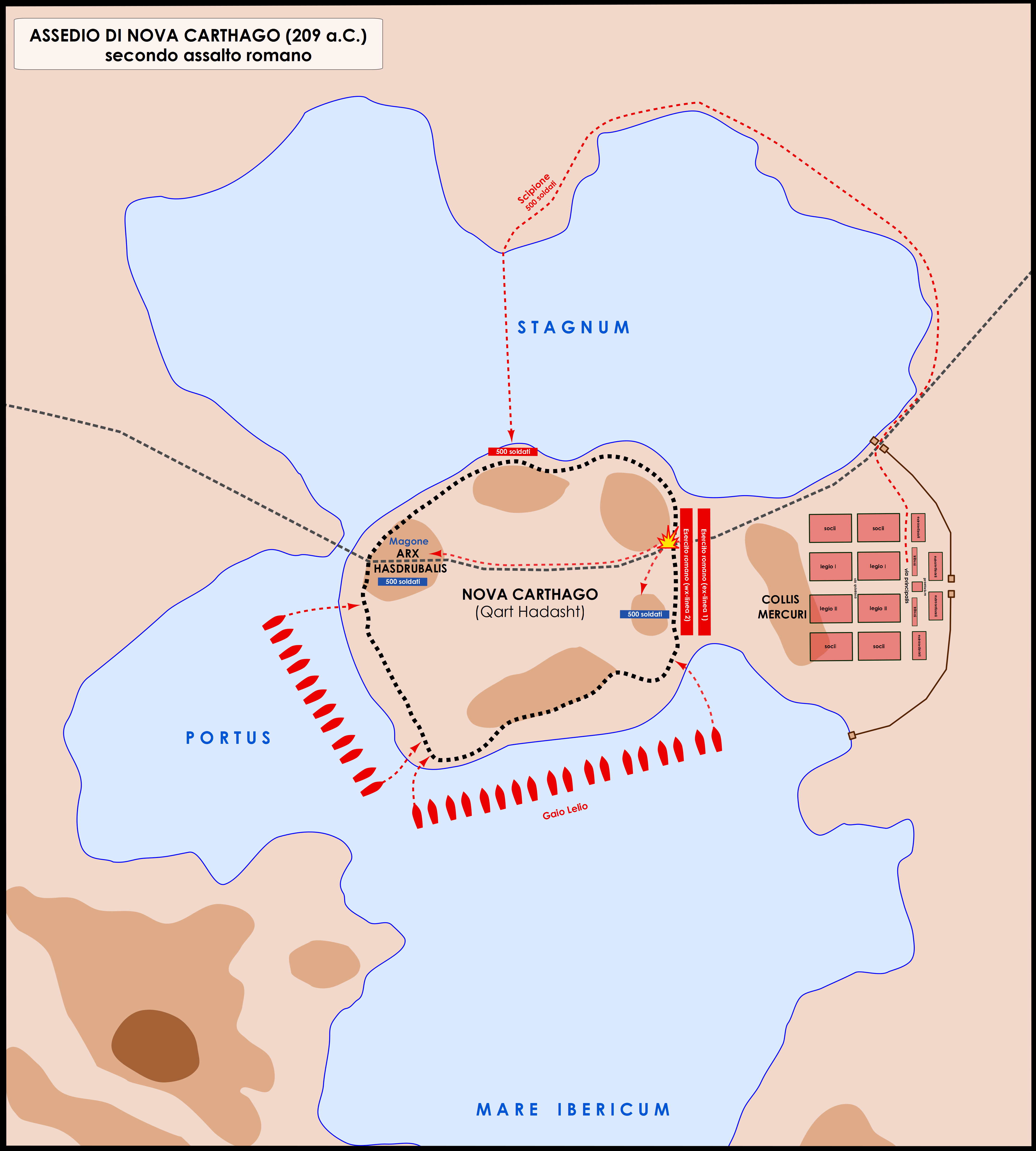 Assedio di Nova Carthago da parte di Scipione Africano - secondo e decisivo assalto (209 a.C.)